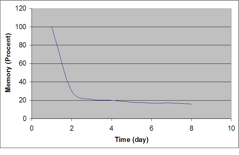 自己excel制作的